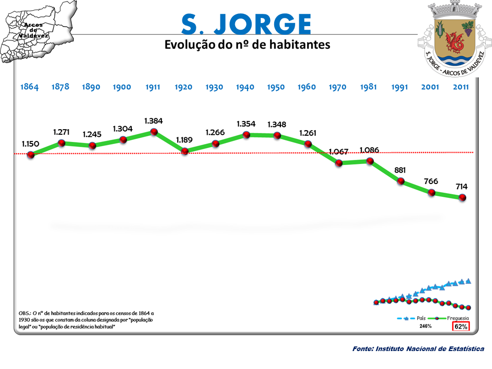 Censos 1864/2011